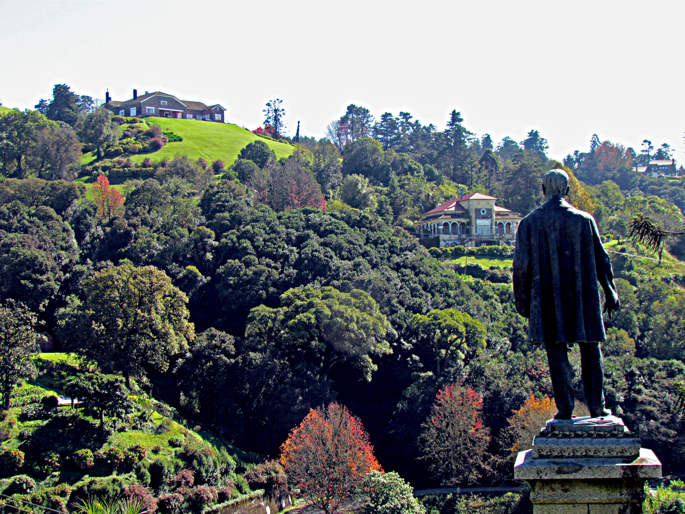 A 30Km de San Miguel de Tucumán, situada a 1300m sobre el nivel del mar, es una villa turística muy apreciada.